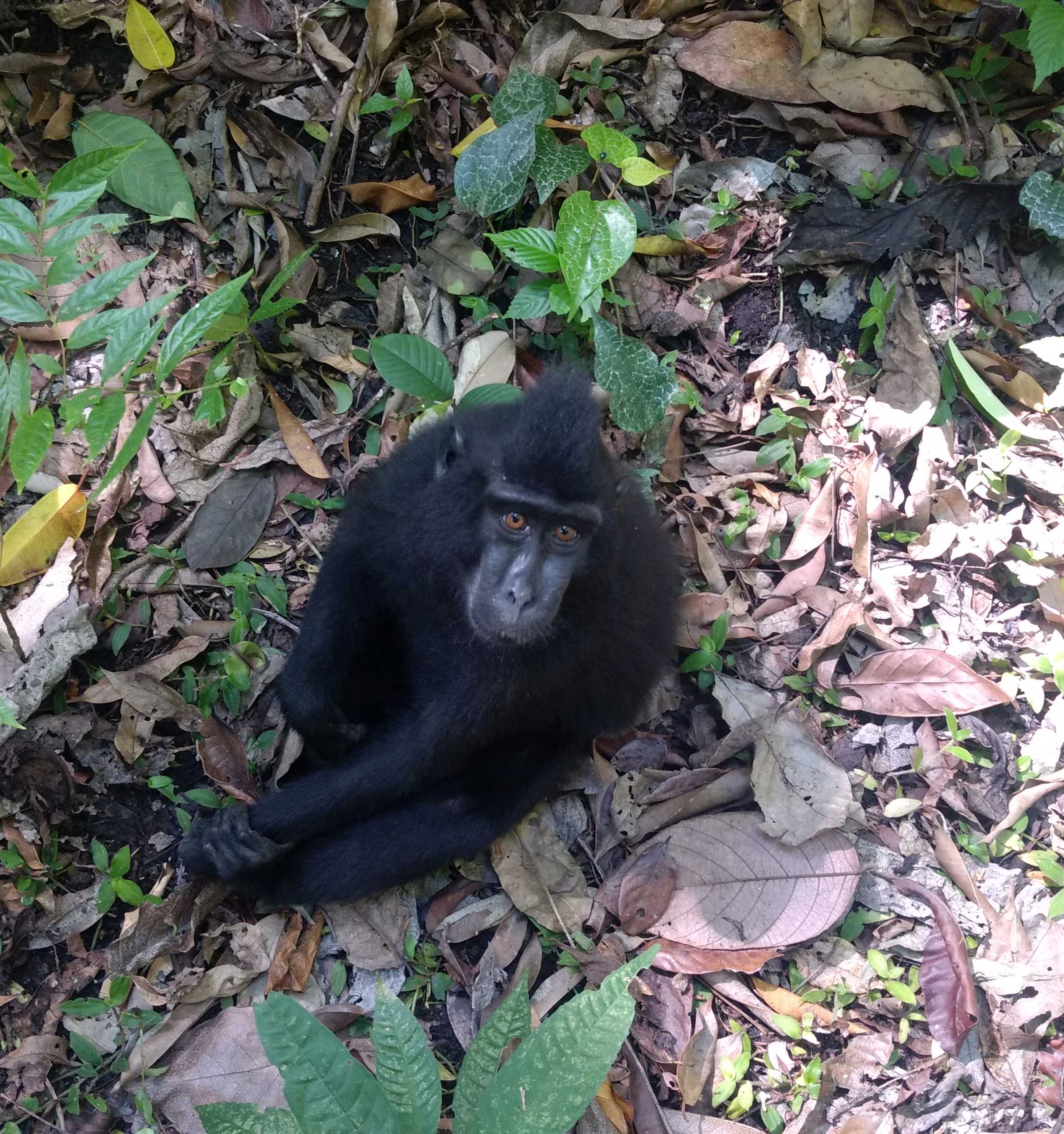 Schopfaffe am Waldboden